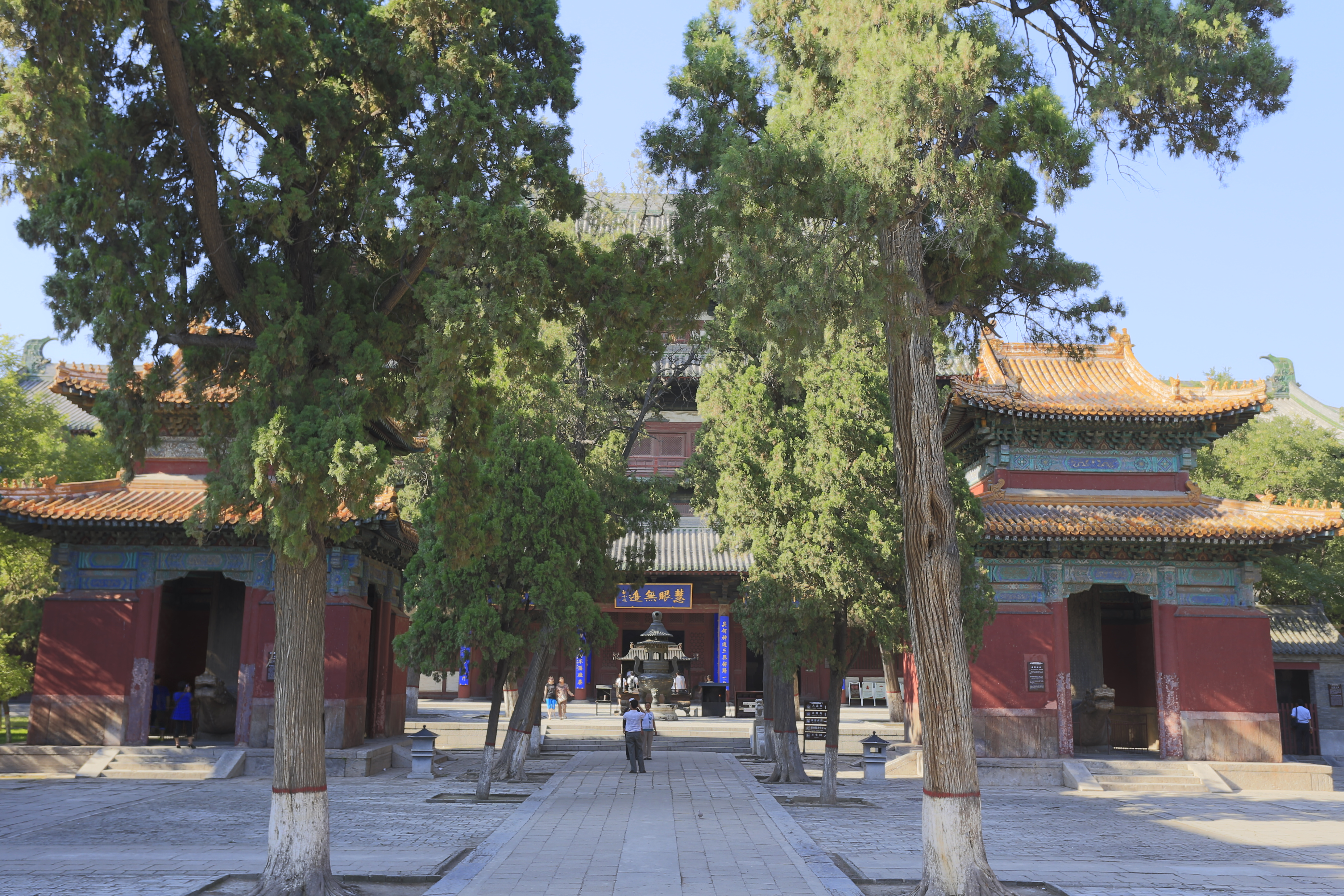 正定隆兴寺 大悲阁及康熙御碑亭、乾隆御碑亭